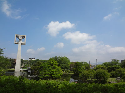 松見公園（つくば市）